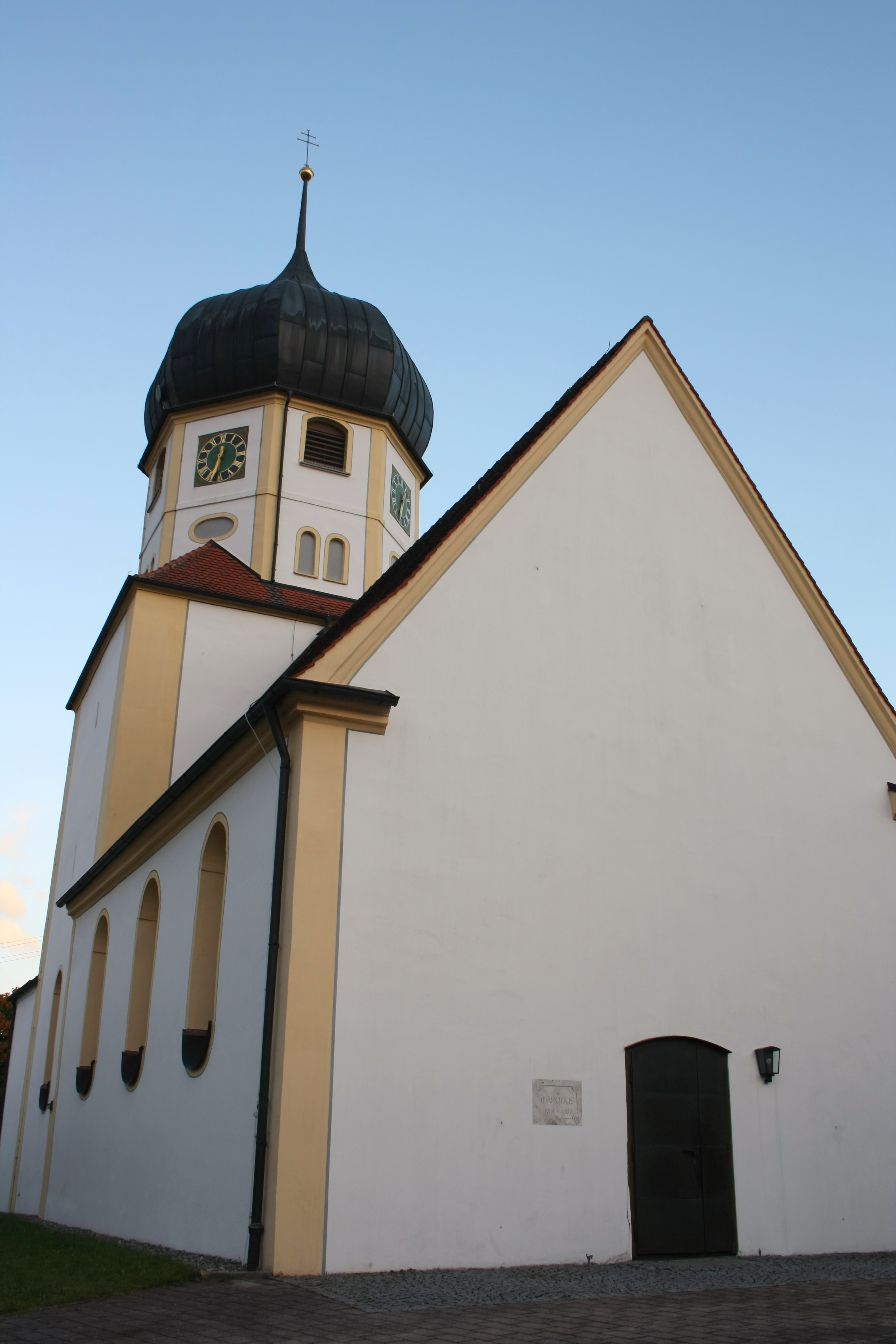 Katholische Pfarrkirche St. Martin in Dattenhausen, einem Ortsteil von Ziertheim, Chorturmkirche mit Zwiebelturm, Ansicht Nordwesten